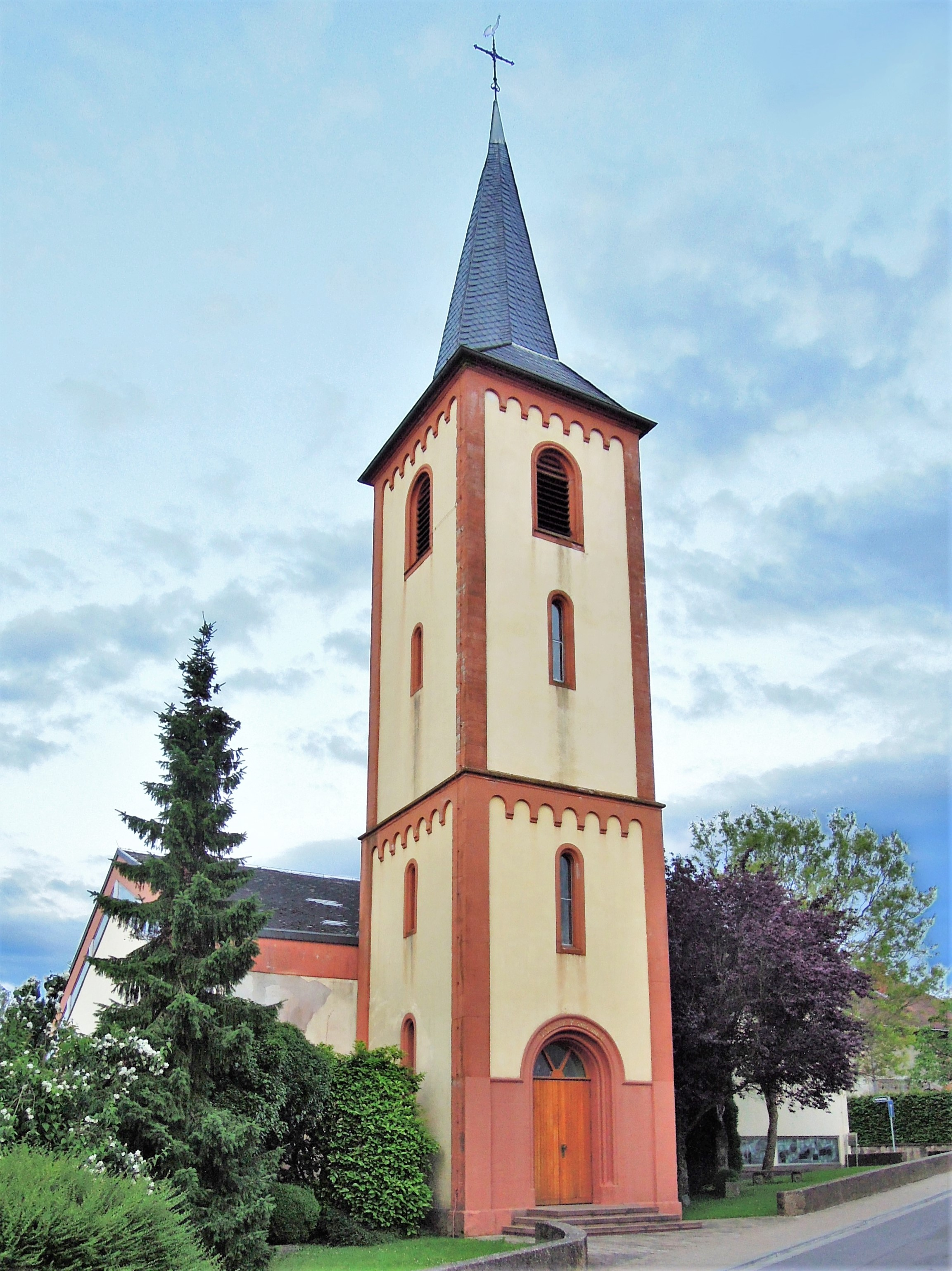 Keltenstraße, kath. Pfarrkirche Kreuzerhöhung, 1864 Turm, 1970–80 neues Kirchenschiff (Einzeldenkmal)